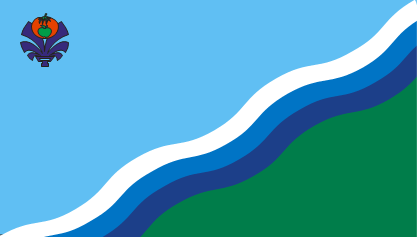 Флаг города Слободзея (Приднестровье)